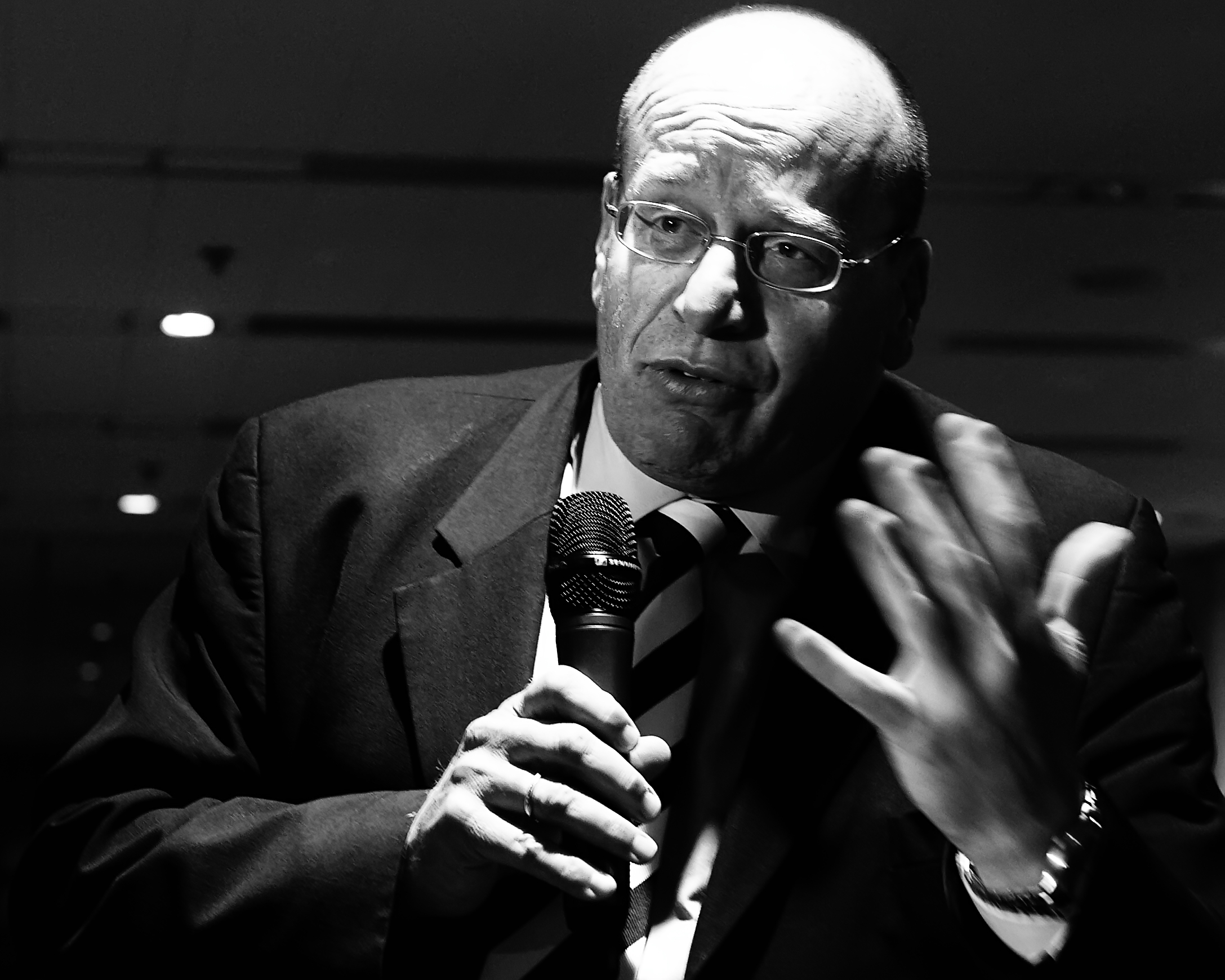 Fred Teeven bij het verkiezingsdebat van de HvA